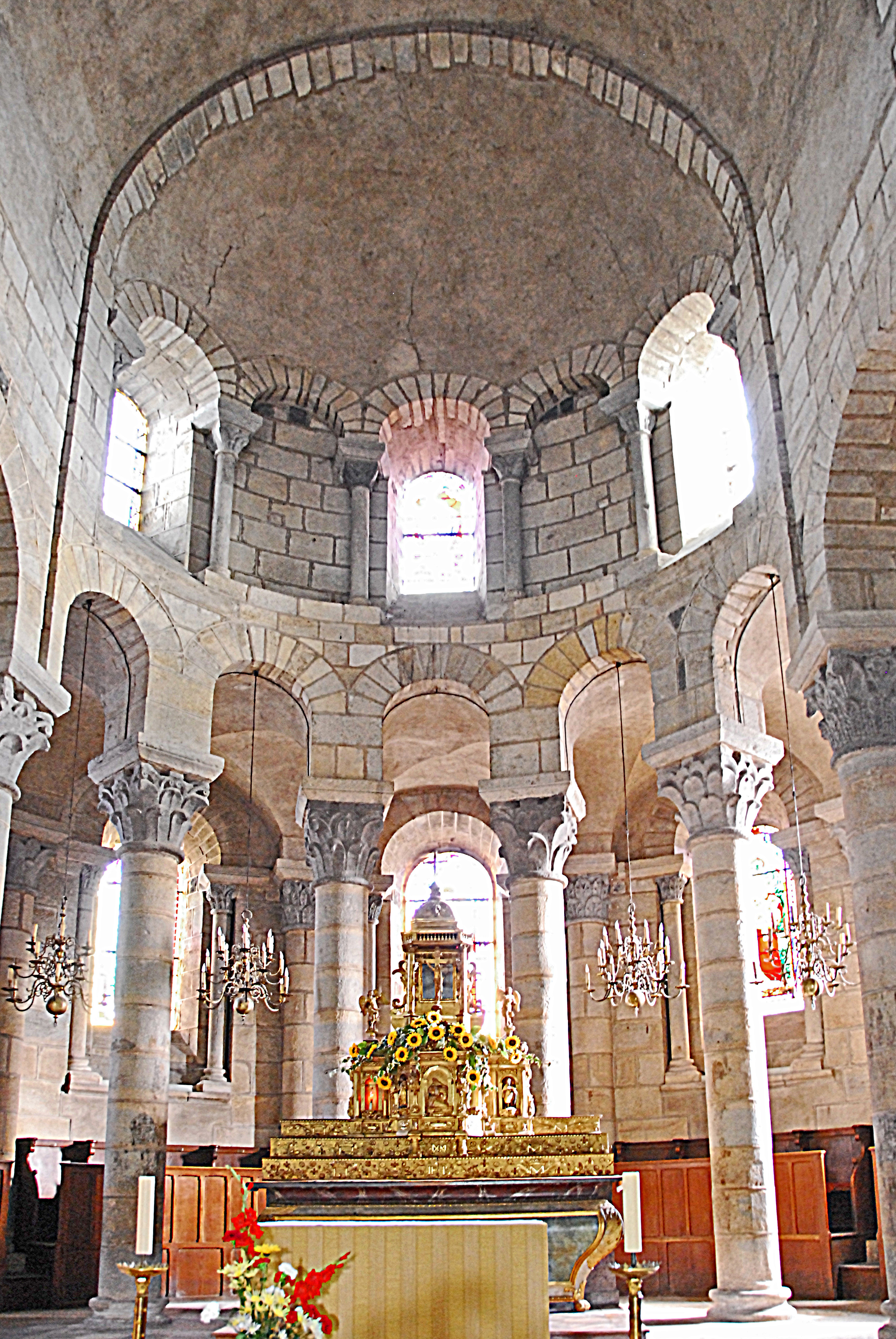 St-Saturnin (Puy-de-Dôme), Chorapsis